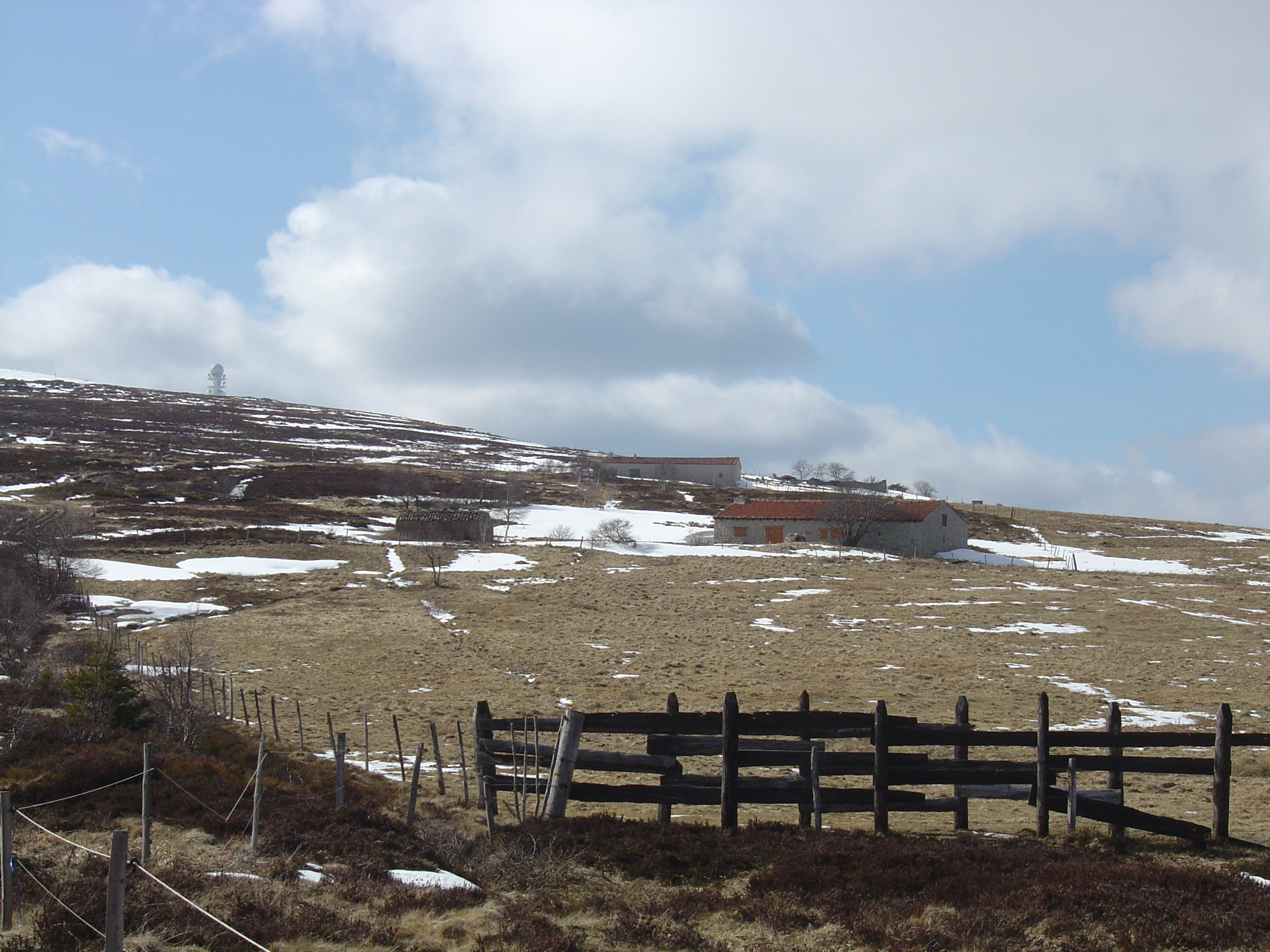 Les jasseries de Colleigne. Elles sont en toits de tuiles rouges, non en toits de chaume.